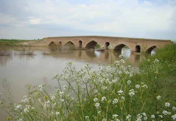 پل کوریجان